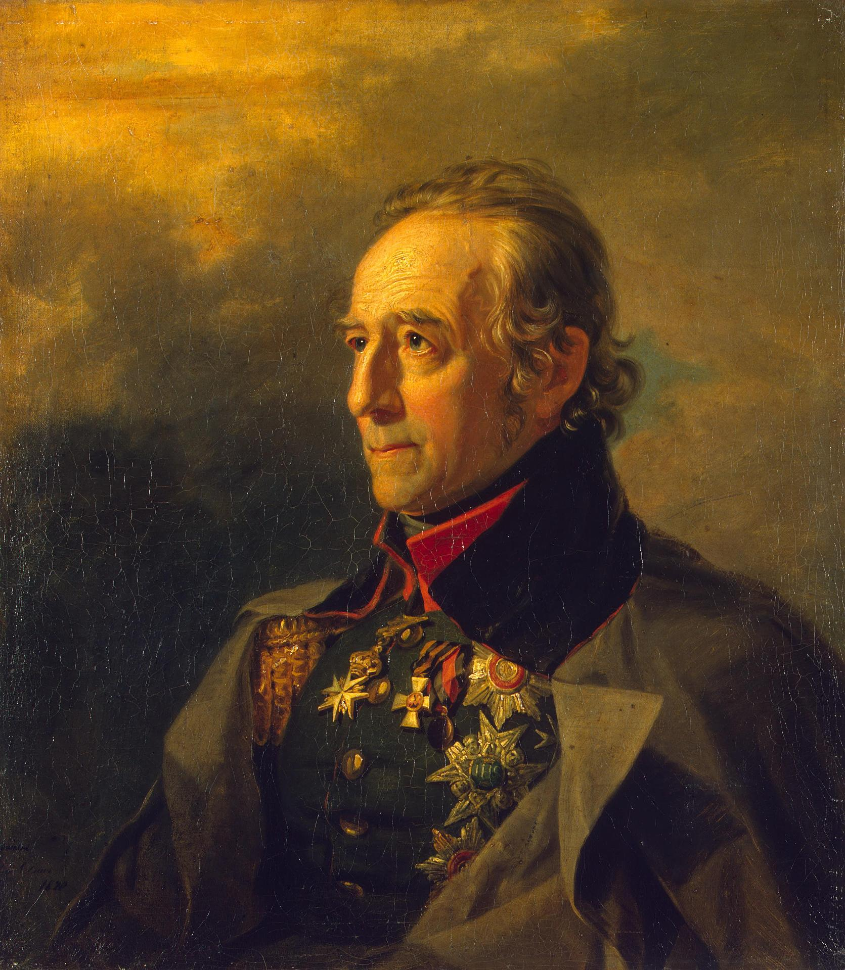 Pyotr Kornilovich Sukhtelen 1-st (02.08.1751 – 06.01.1836) russian general